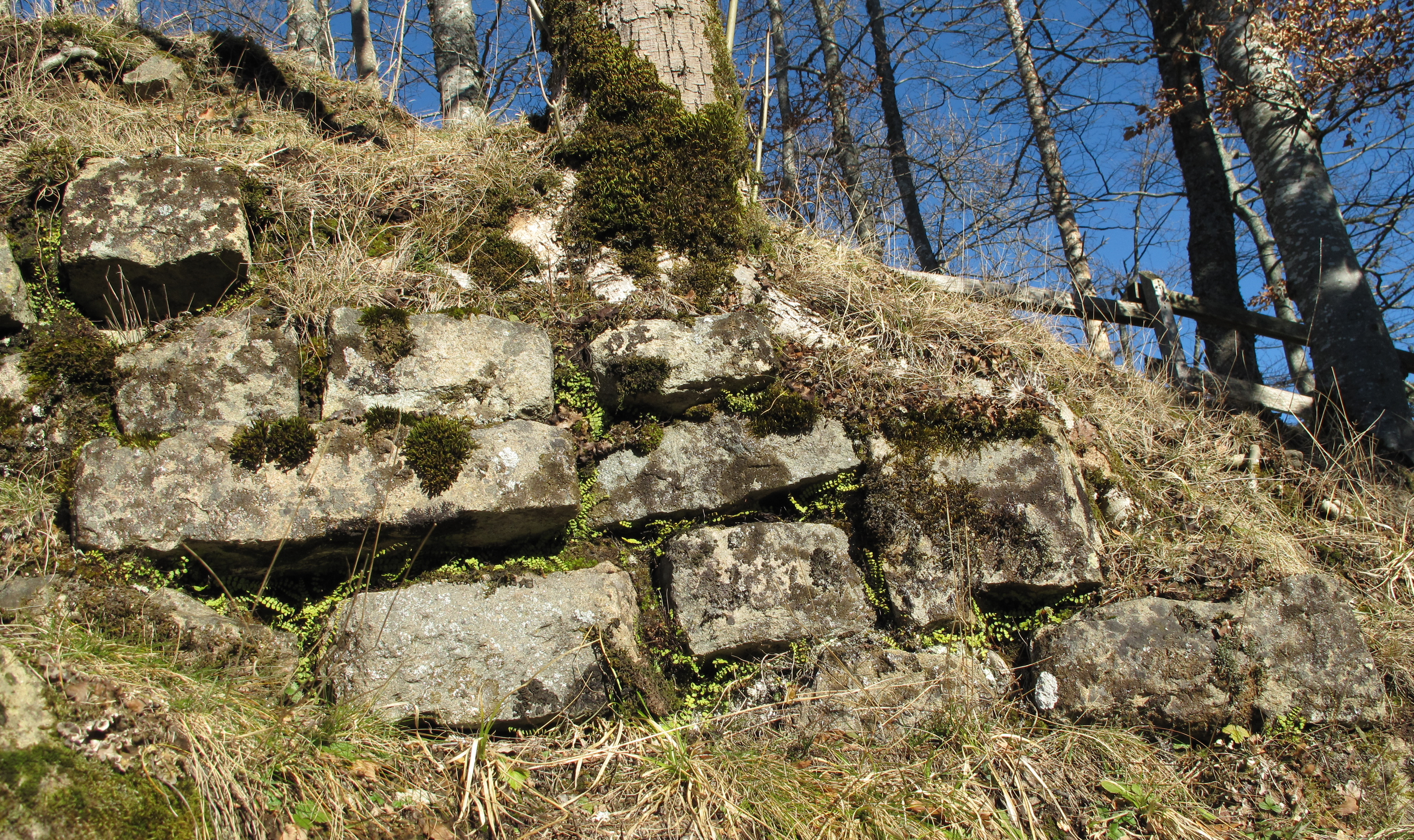 Südlicher Bebauungsrest der Hauptburg.